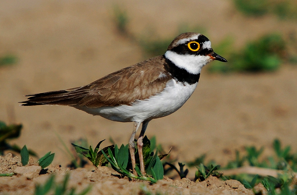 Kurdî: Qoruxçî